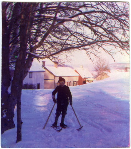 Gutt på ski. Skiløper. Trefargefoto. 1907. Foto Harald Renbjør/Levanger Museum